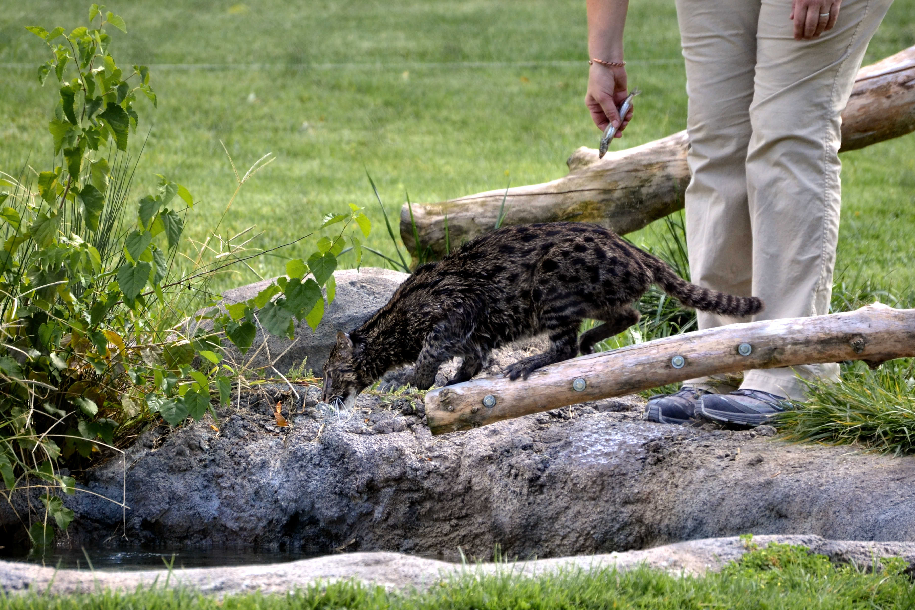 Chat pêcheur (Prionailurus viverrinus) au zoo de Cincinnati.